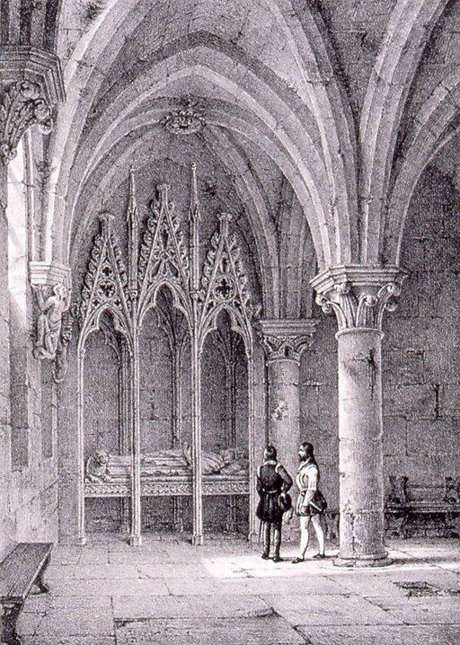 Cathédrale de Strasbourg. Vue du tombeau de l'Evêque Conrad de Lichtenberg et de l'intérieur de l'ancienne chapelle de St Jean Baptiste. Bibliothèque nationale et universitaire de Strasbourg